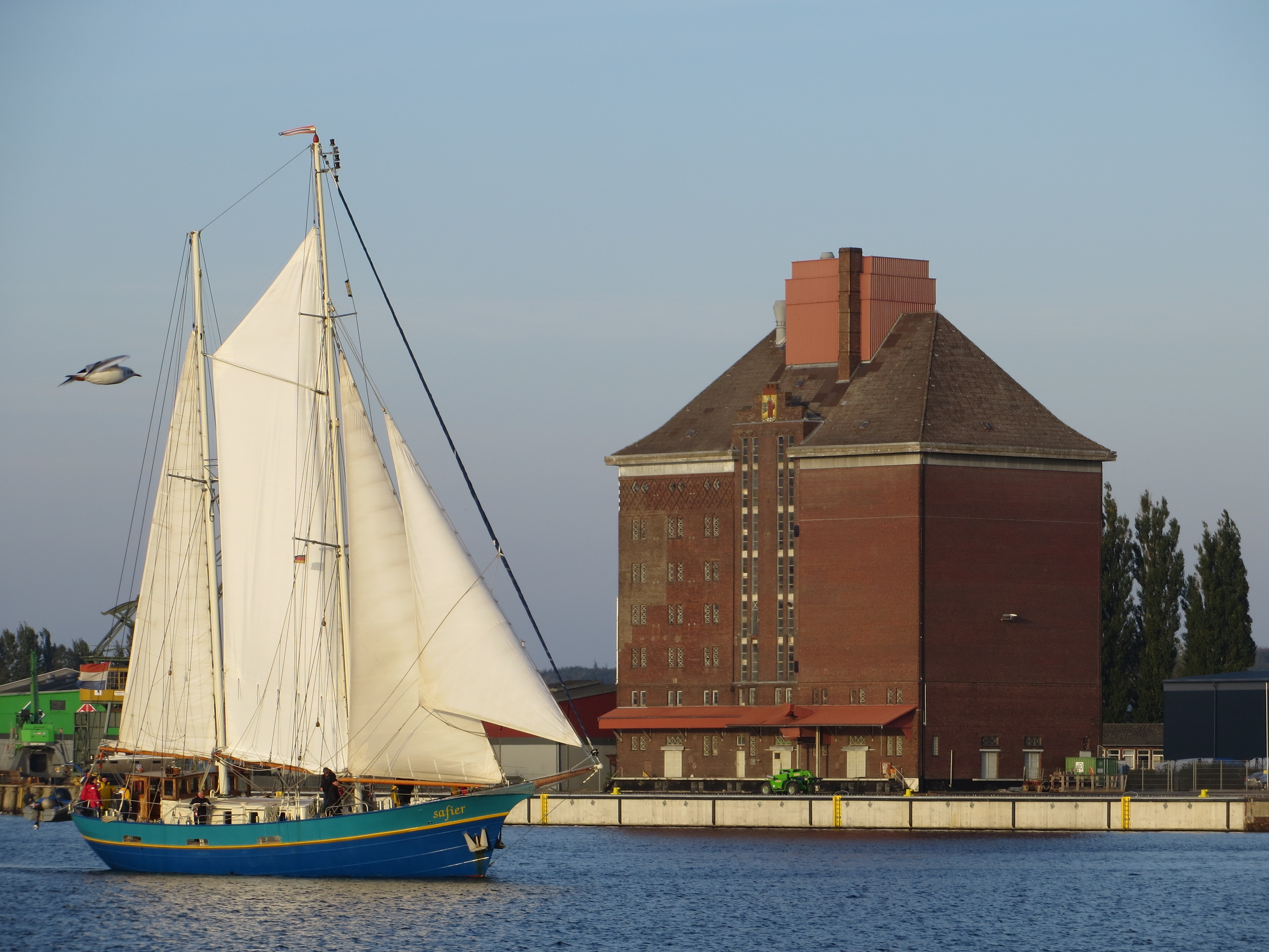 Freihafen-Silo von Paul Ziegler, Harniskai 22, Bild 04